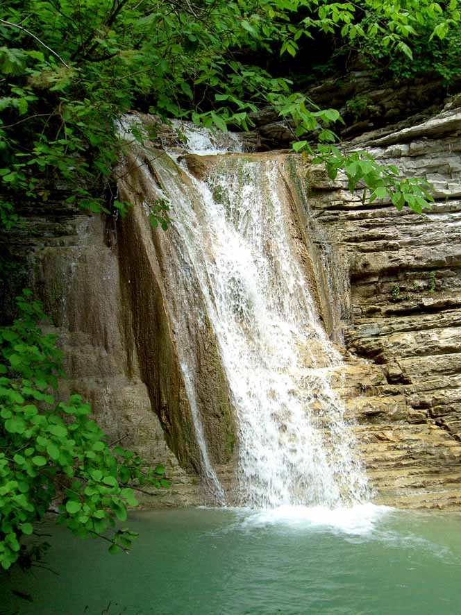 Водопад в долине реки Пшада